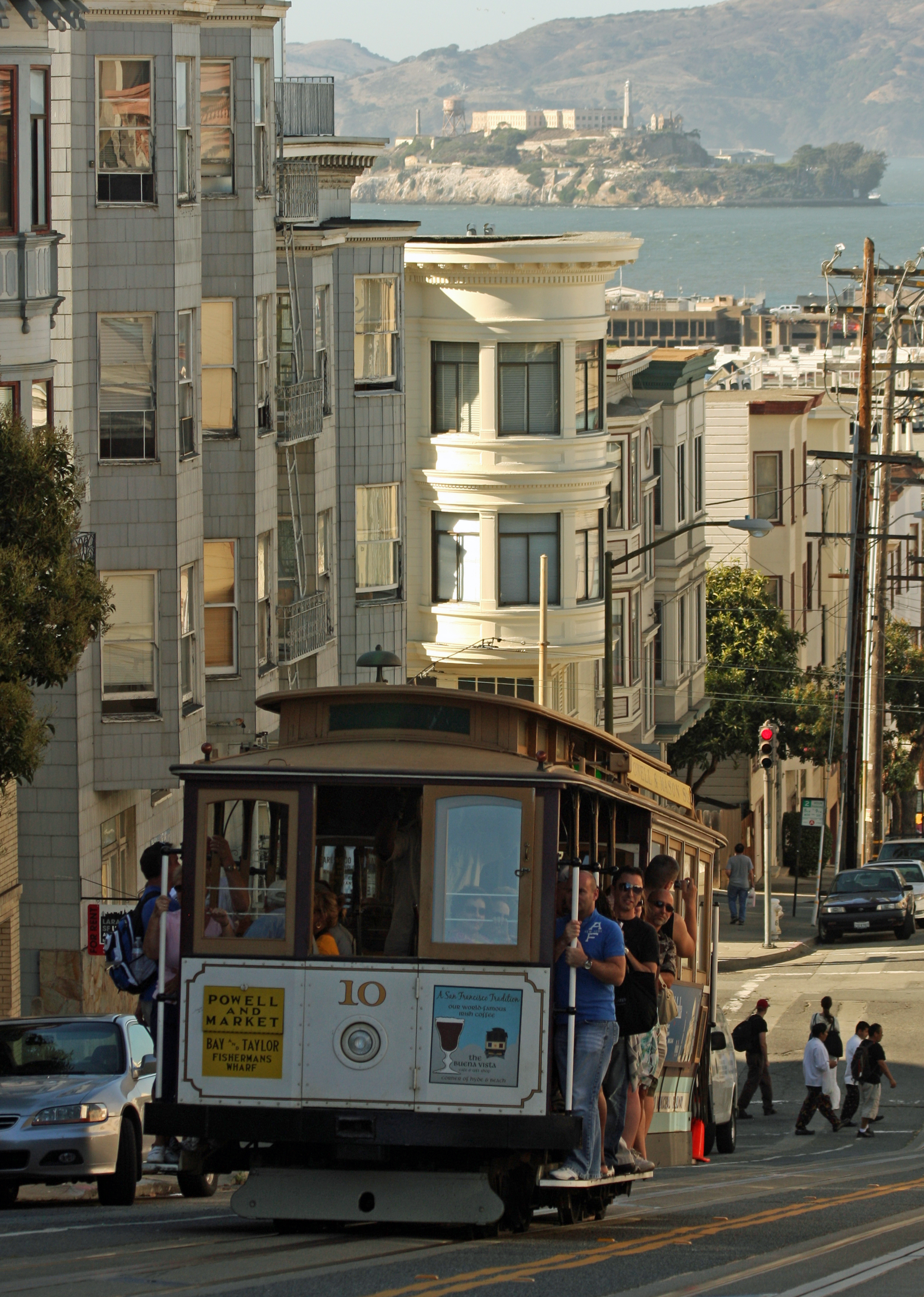 San Francisco Cable Car 15